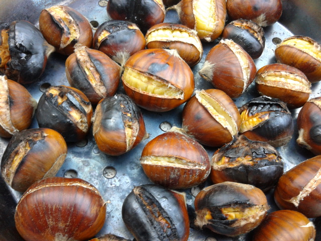 Caldarroste della Valle Roveto